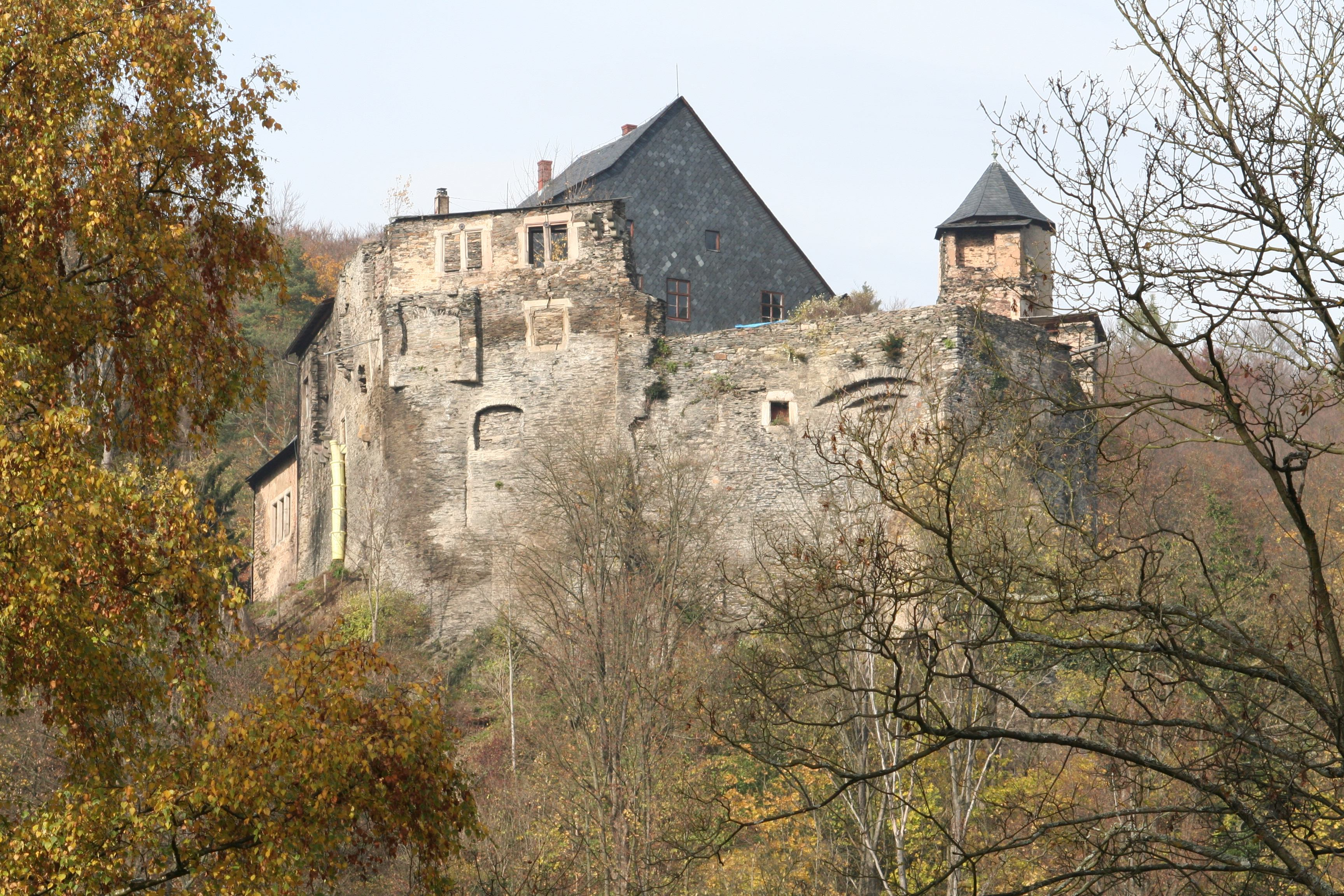 Schloss Wespenstein in Gräfenthal in Südthüringen